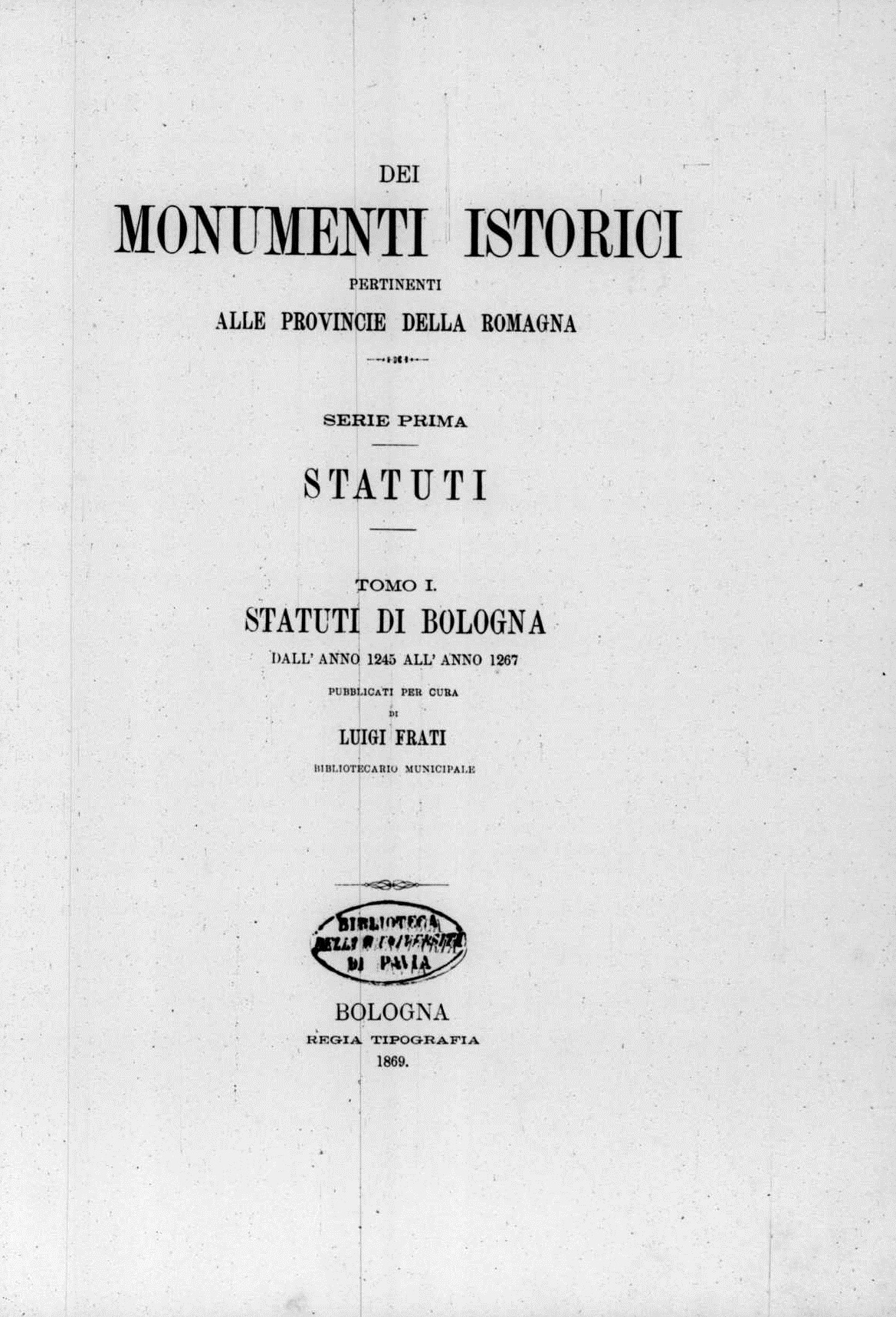 Frontespizio